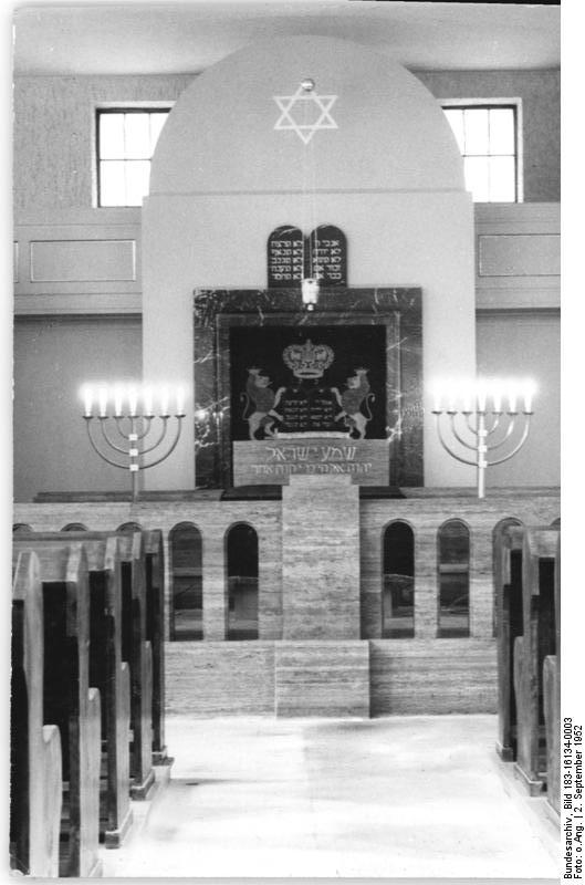 Erfurt, Synagoge, Innenansicht Zentralbild TBD-2.9.52 Die erste neu erbaute Synagoge. Das erste in der DDR neu erbaute jüdische Gotteshaus wurde am 31.8.1952 in einem Festakt in Erfurt eingeweiht. Die Synagoge wurde an derselben Stelle errichtet, wo in der Kristallnacht des 9. November 1938 faschistische Banden die alte Synagoge zerstörten. Die Regierung der DDR stellte für den Wiederaufbau des jüdischen Gotteshauses 290.000 DM zur Verfügung. UBz: Blick in das Innere der neuen Synagoge.